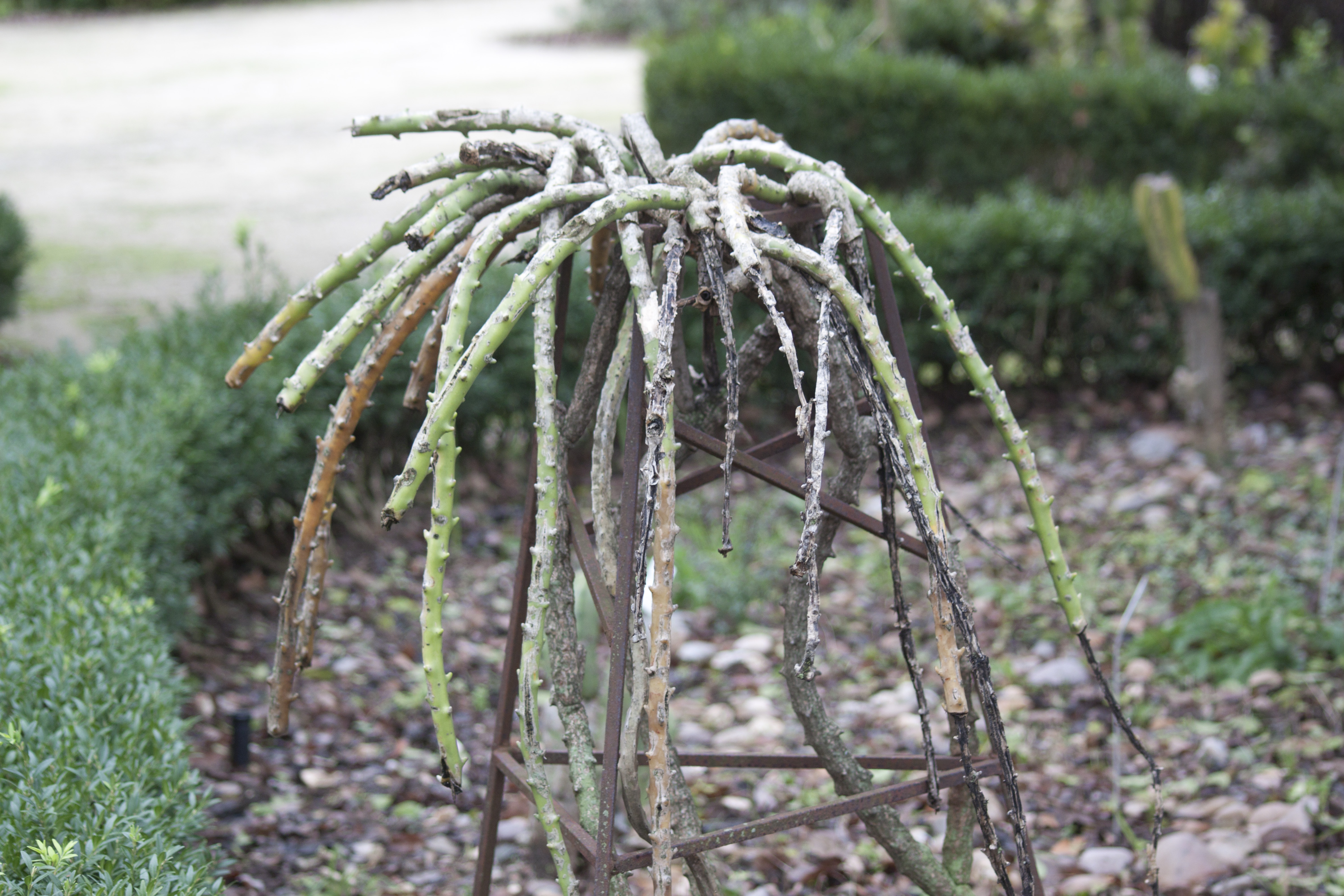 Selenicereus hamatus (Jardim Botânico de Lisboa)